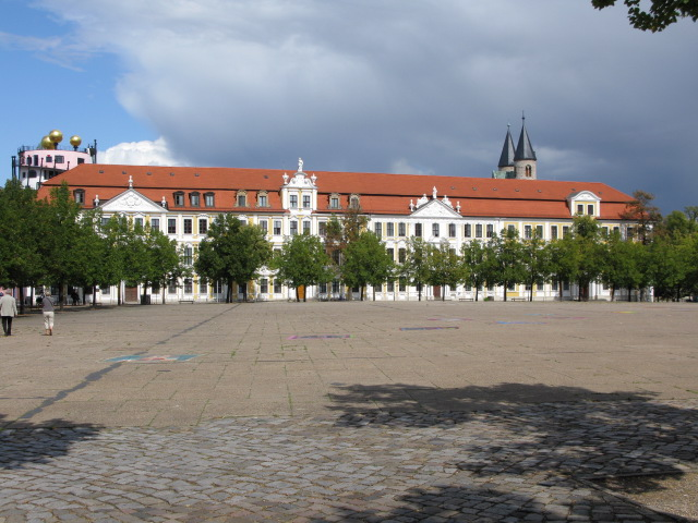 Der Landtag Sachsen-Anhalt , Domplatz, Magdeburg (The Landtag or state parliament for Saxony-Anhalt)